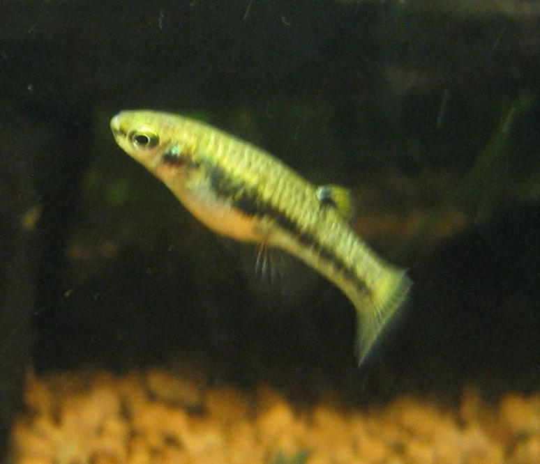 Heterandria formosa, adult female